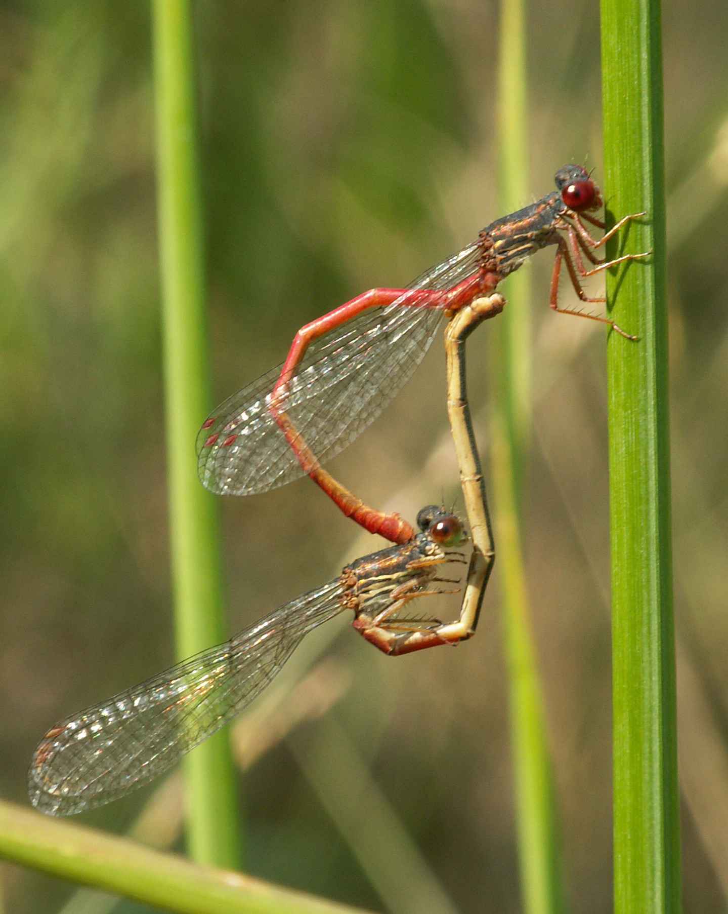 Ceriagrion tenellum tandem Brunssummer Heide Netherlands